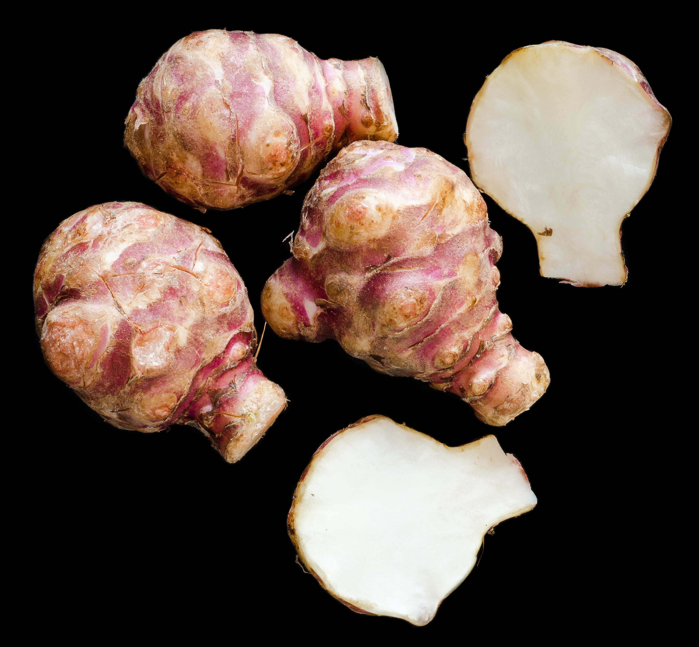 Helianthus tuberosus (topinambour) sur fond noir, pris avec un Nikon D7000 et un objectif Micro-Nikkor 60mm 2.8 AF-D